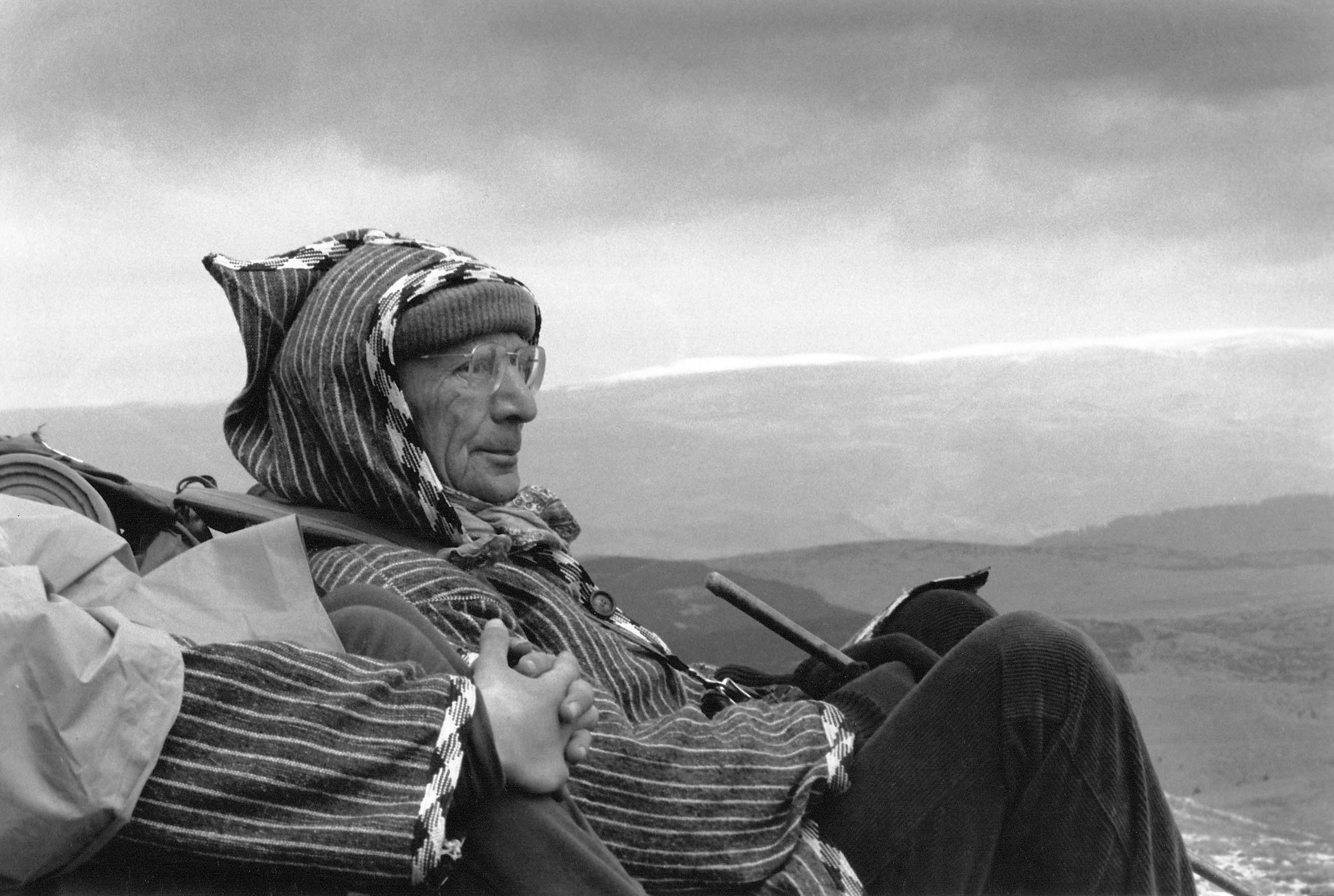 Michel Menu, le vieux goumier à l’éternelle jeunesse. Né en 1916, Michel Menu, ancien résistant et officier après son évasion des camps allemands en 1941 fut après la guerre à l’origine du renouveau du scoutisme français. En 1949, il crée les Raiders Scouts et les patrouilles libres puis les Goums en 1969 : des marches spirituelles et physiques dans le silence désertique des Causses. Décédé le 2 mars 2015 dans sa 100e année, je lui rends hommage avec cette image d’archives prise au cours d’un raid sur le causse Méjean en 1991, il avait alors 75 ans. Michel Menu était officier de la Légion d’Honneur. Thomas Goisque